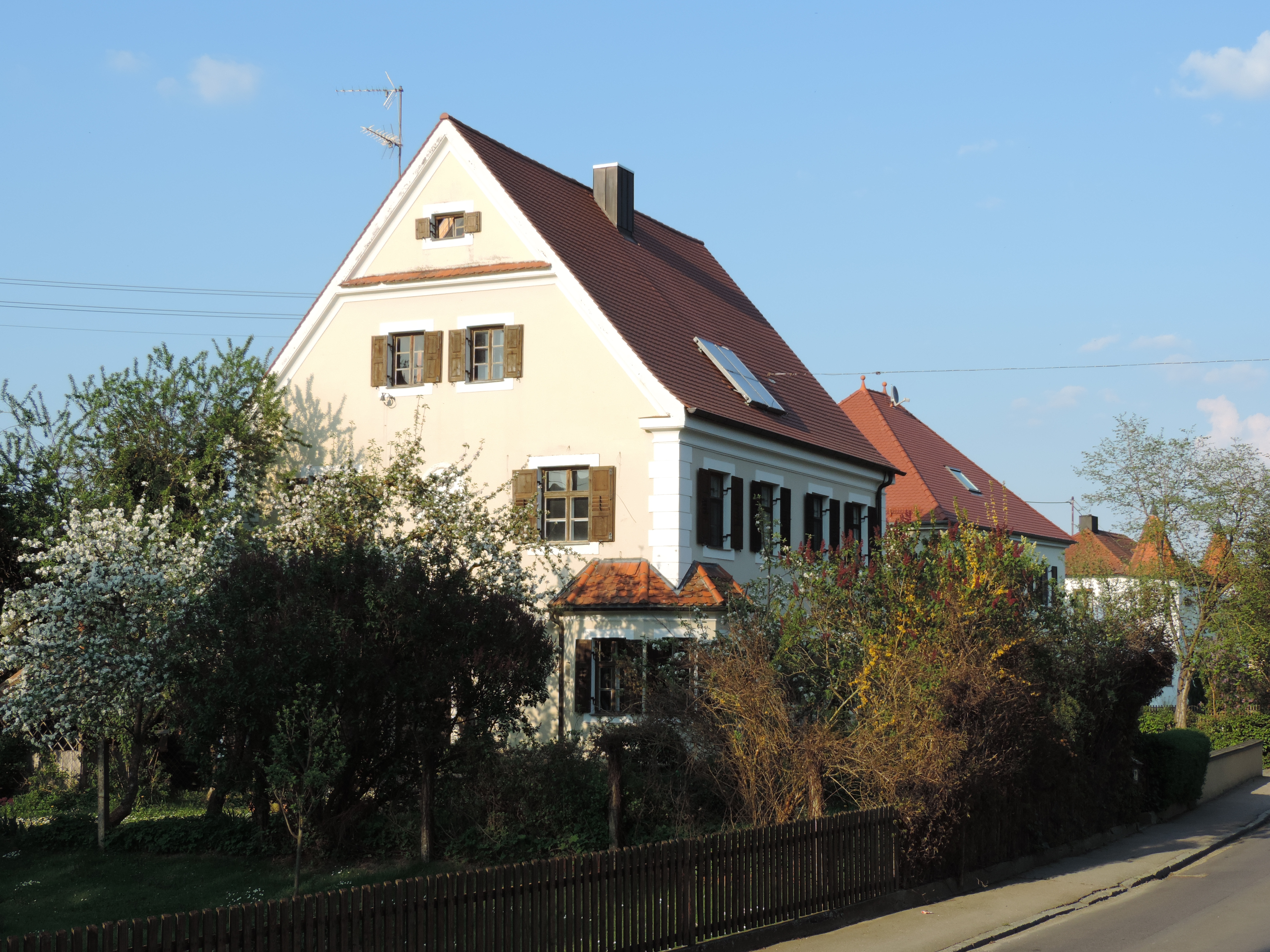 Ehem. Pfarrhaus neubarocker, zweigeschossiger Traufseitbau mit Satteldach, polygonalem Eckerker, abgedecktem Giebelgesims und Relief, 1911.